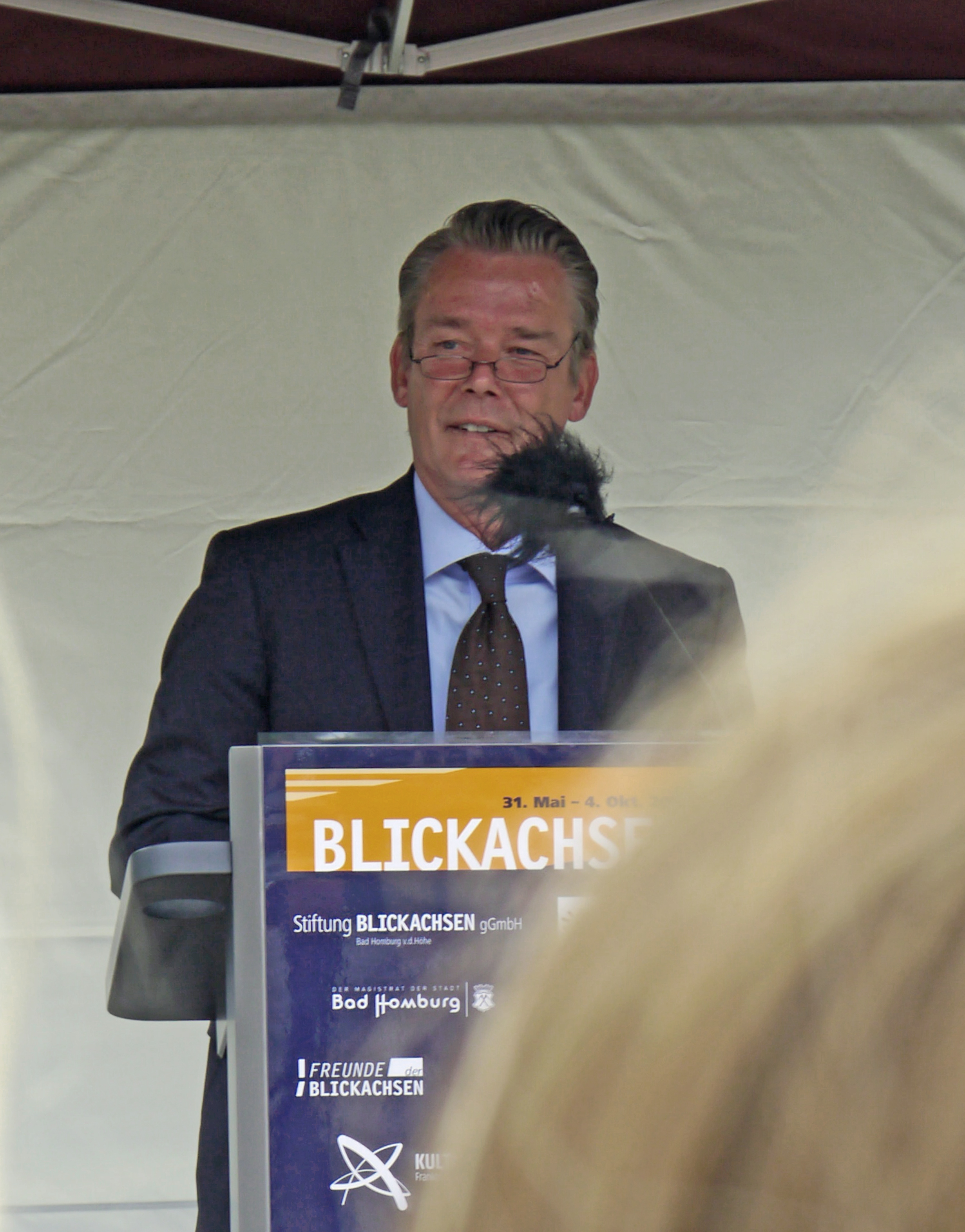 Christian K. Scheffel, Gründer und Kurator von Blickachsen und geschäftsführender Gesellschafter der Blickachsen gGmbH bei der Eröffnung der Ausstellung 2015 auf dem Schmuckplatz in Bad Homburg.